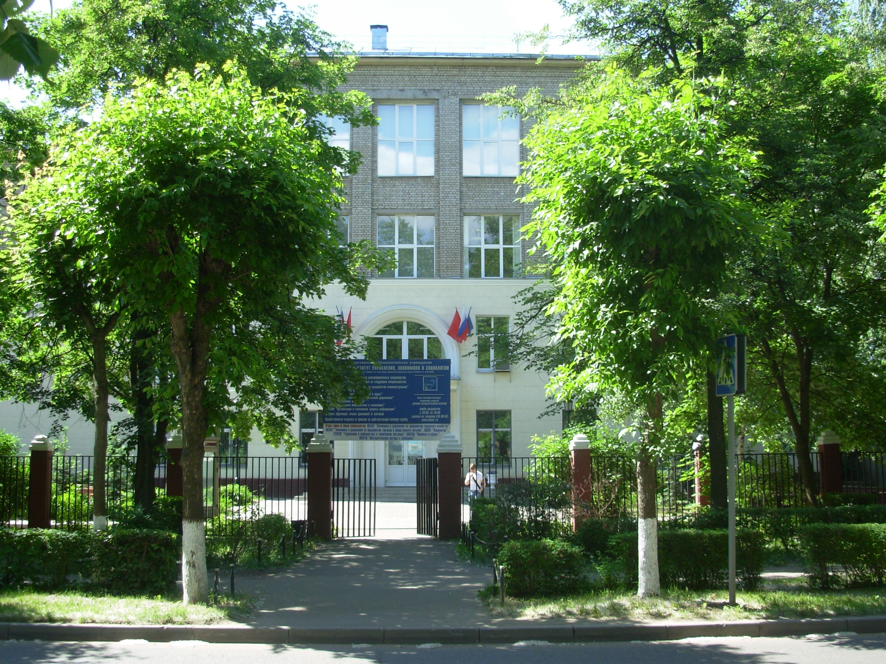 Город Королёв, улица Гагарина, дом 42. Технологический университет (1 корпус)